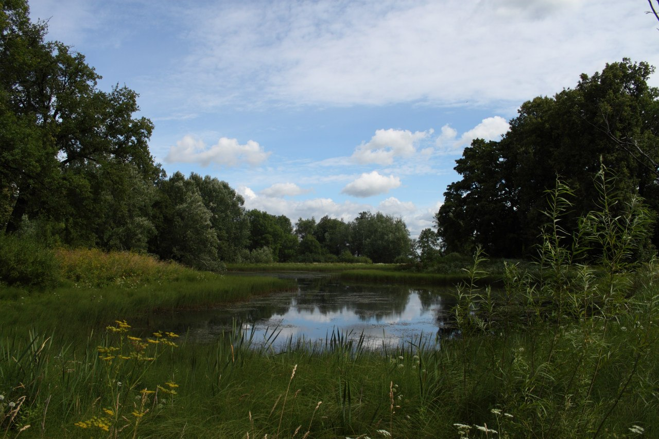 Пруд при даче Самойловой (п. Динамо)